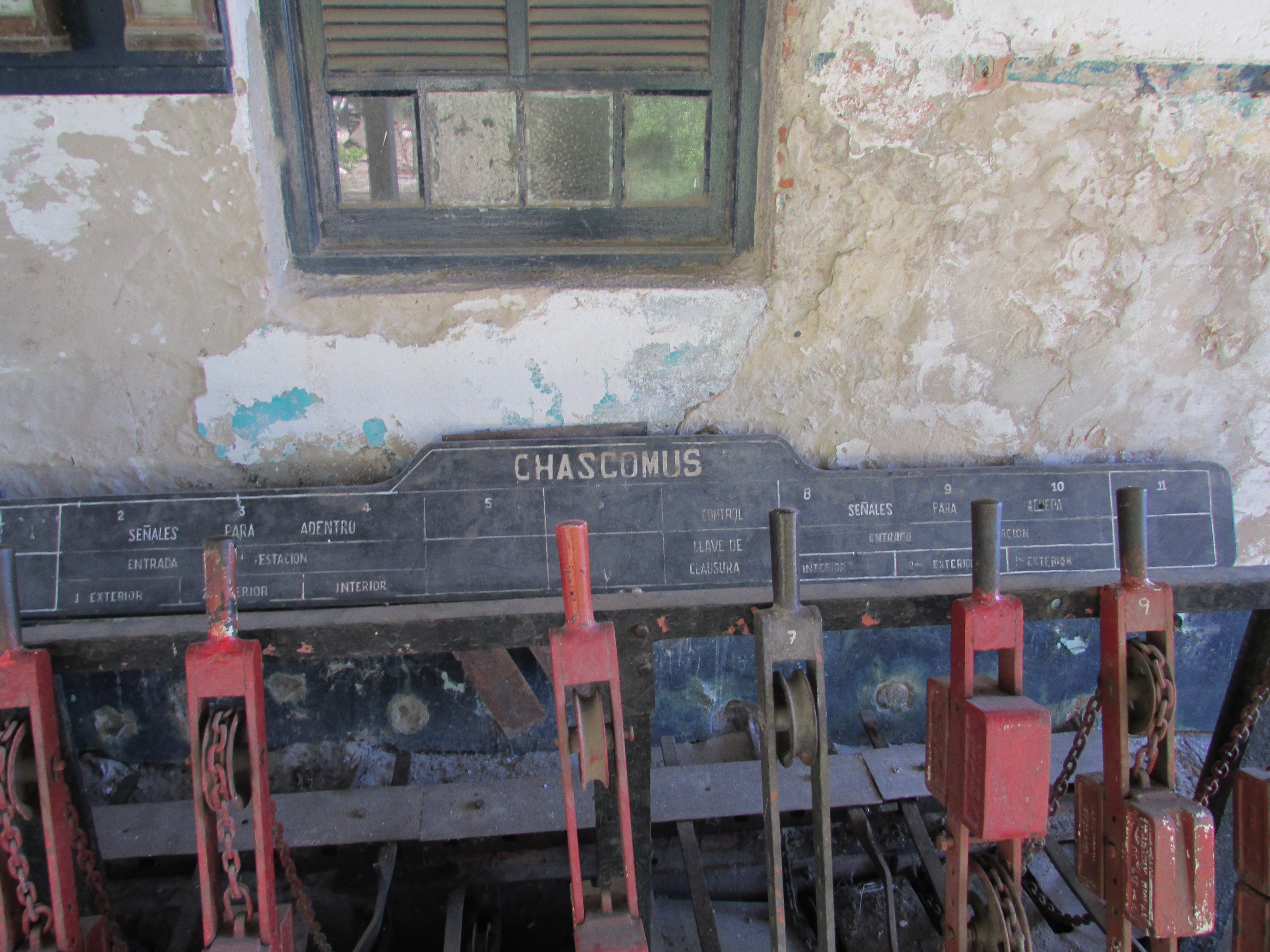 Control de señales ferroviarias en la estación del Ferrocarril General Roca en Chascomús, provincia de Buenos Aires, Argentina.